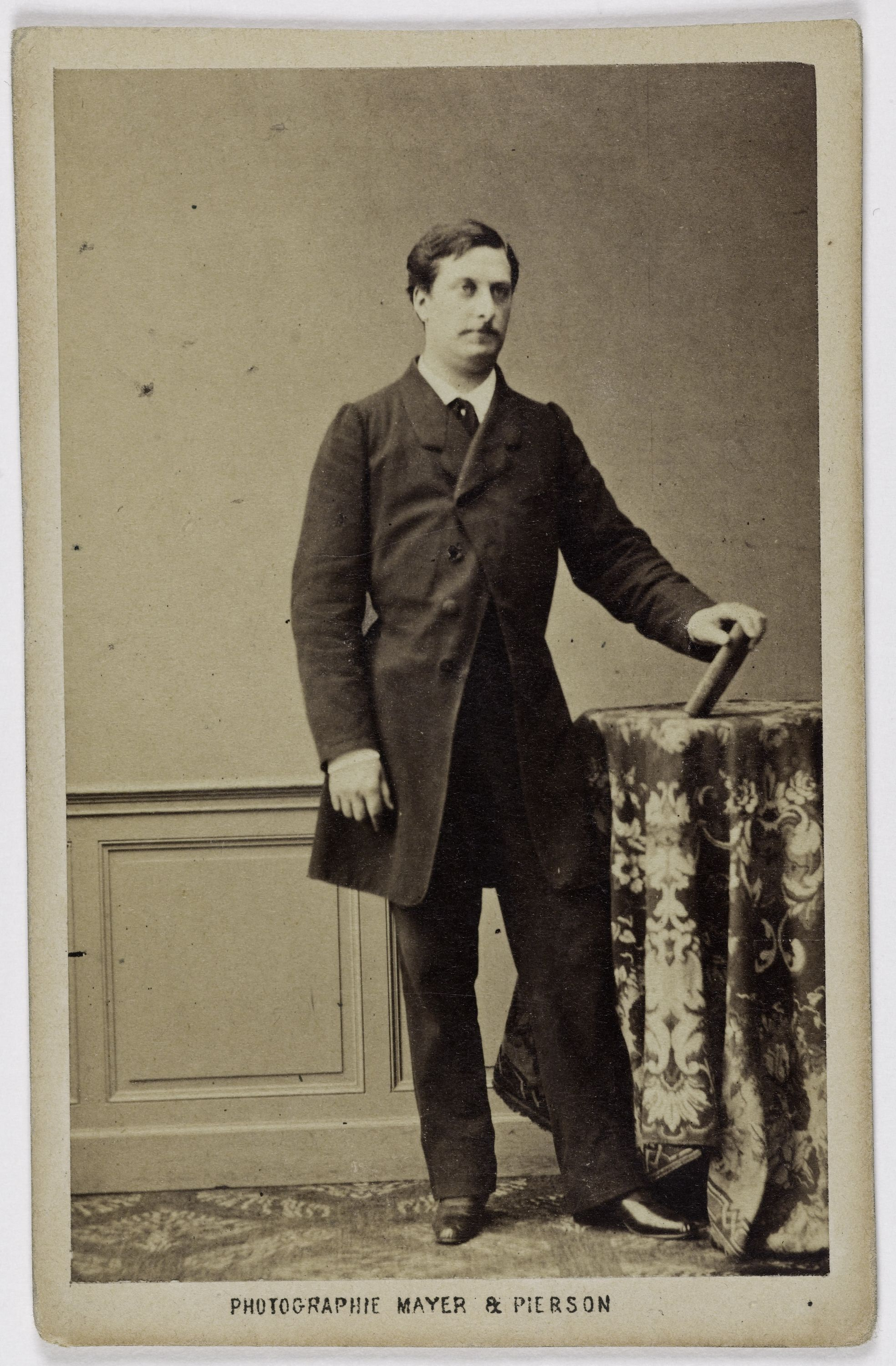 Portrait de Charles, François, Guillaume Duvernoy (acteur aux Bouffes et en province). Carte de visite (recto).Photographie de Mayer Frères et Pierson. Tirage sur papier albuminé. 1860-1890. Paris, musée Carnavalet.